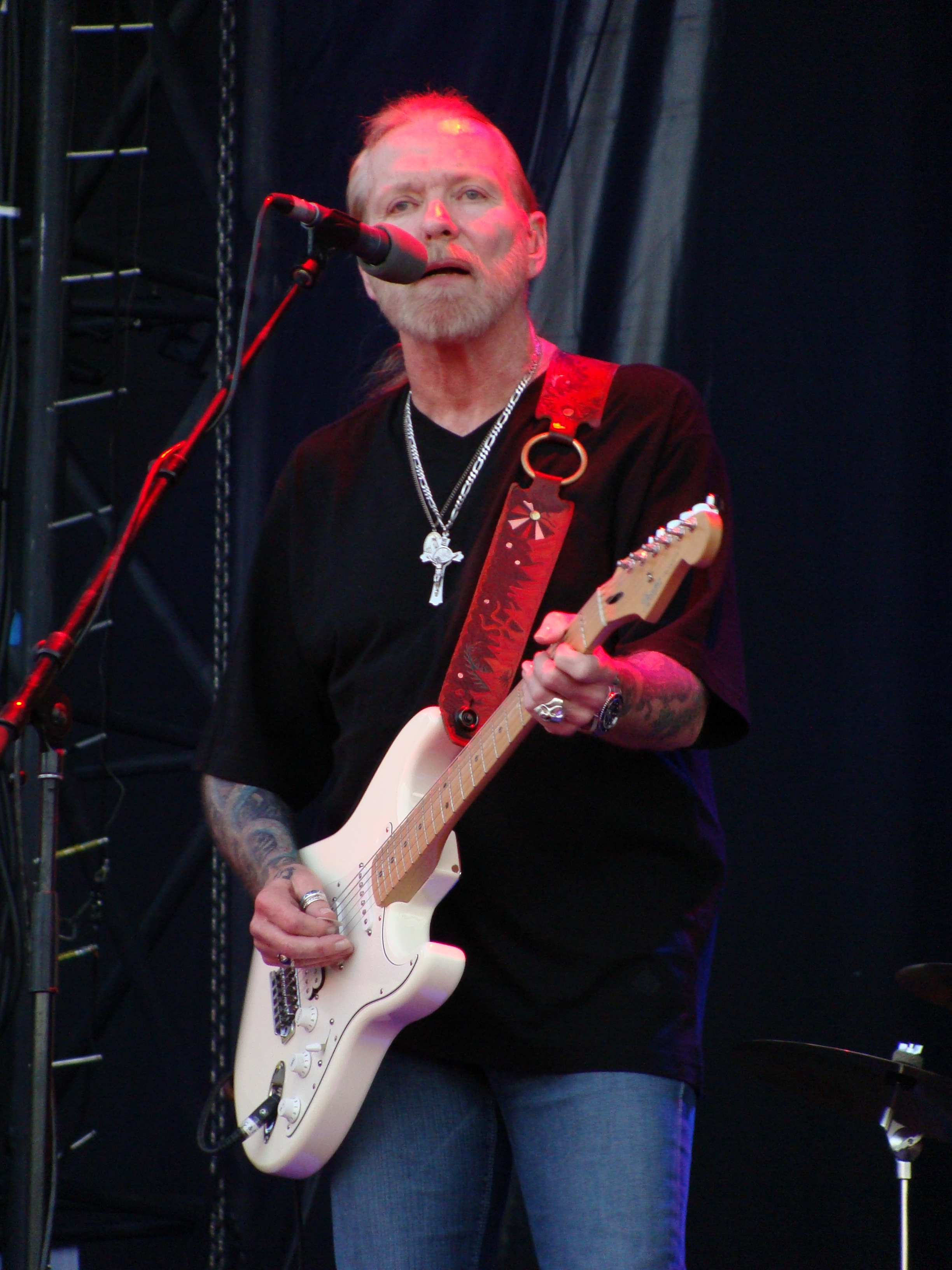 Gregg Allman